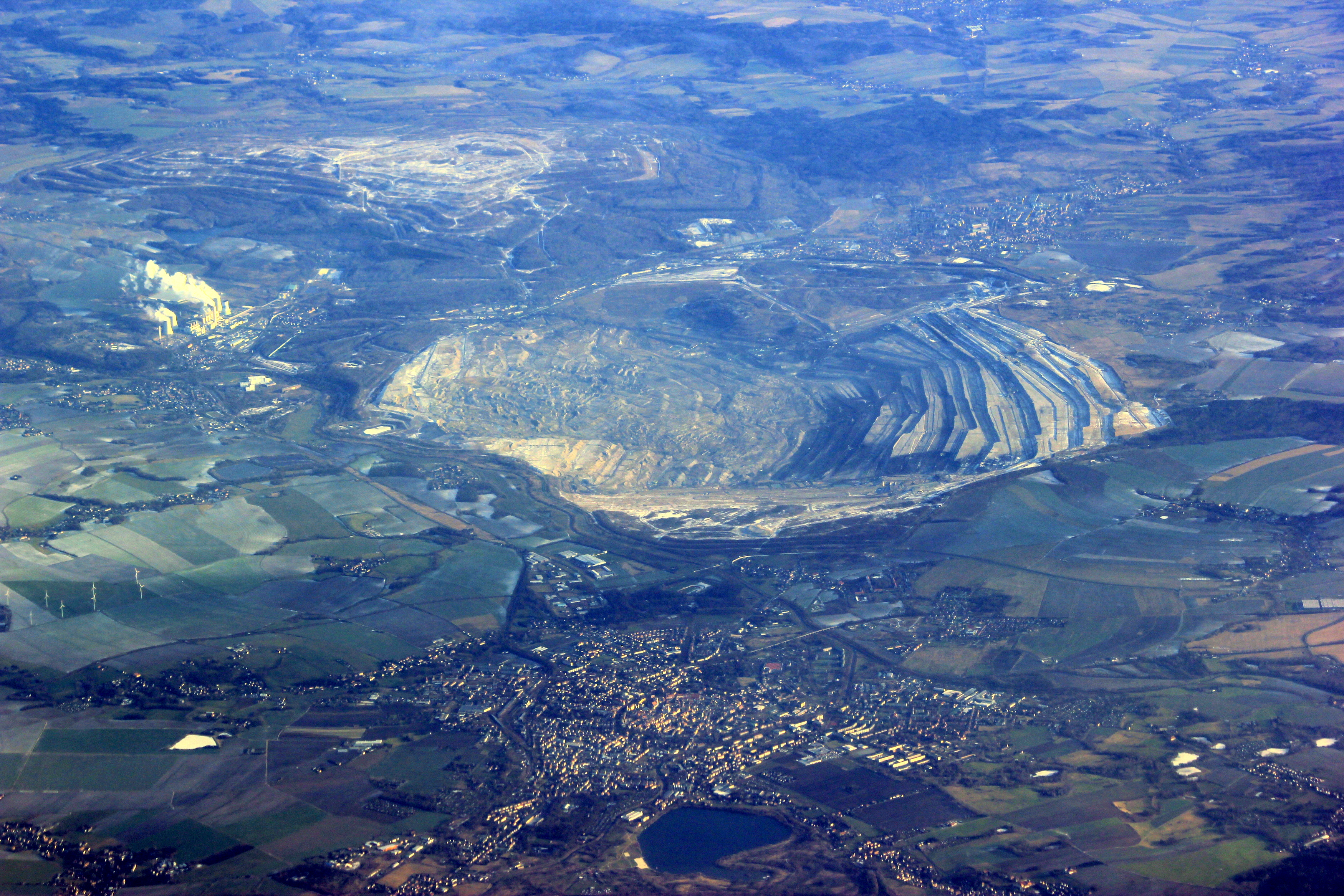 Luftbild des Tagebaus Turów an der deutsch-polnischen Grenze. Im Vordergrund Zittau.